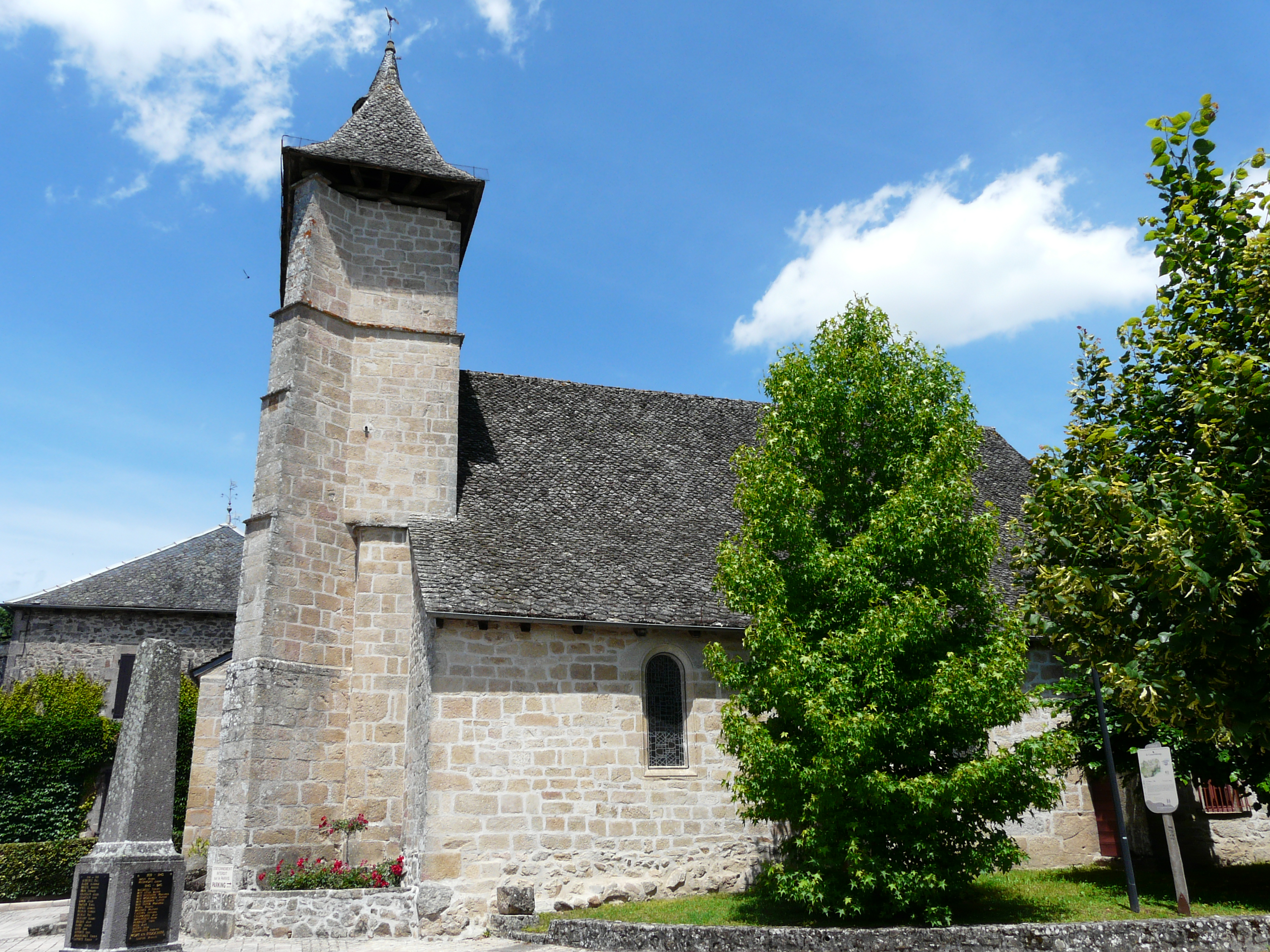 L'église Saint-Cyr-Sainte-Julitte de Saint-Cirgues-la-Loutre, Corrèze, France.